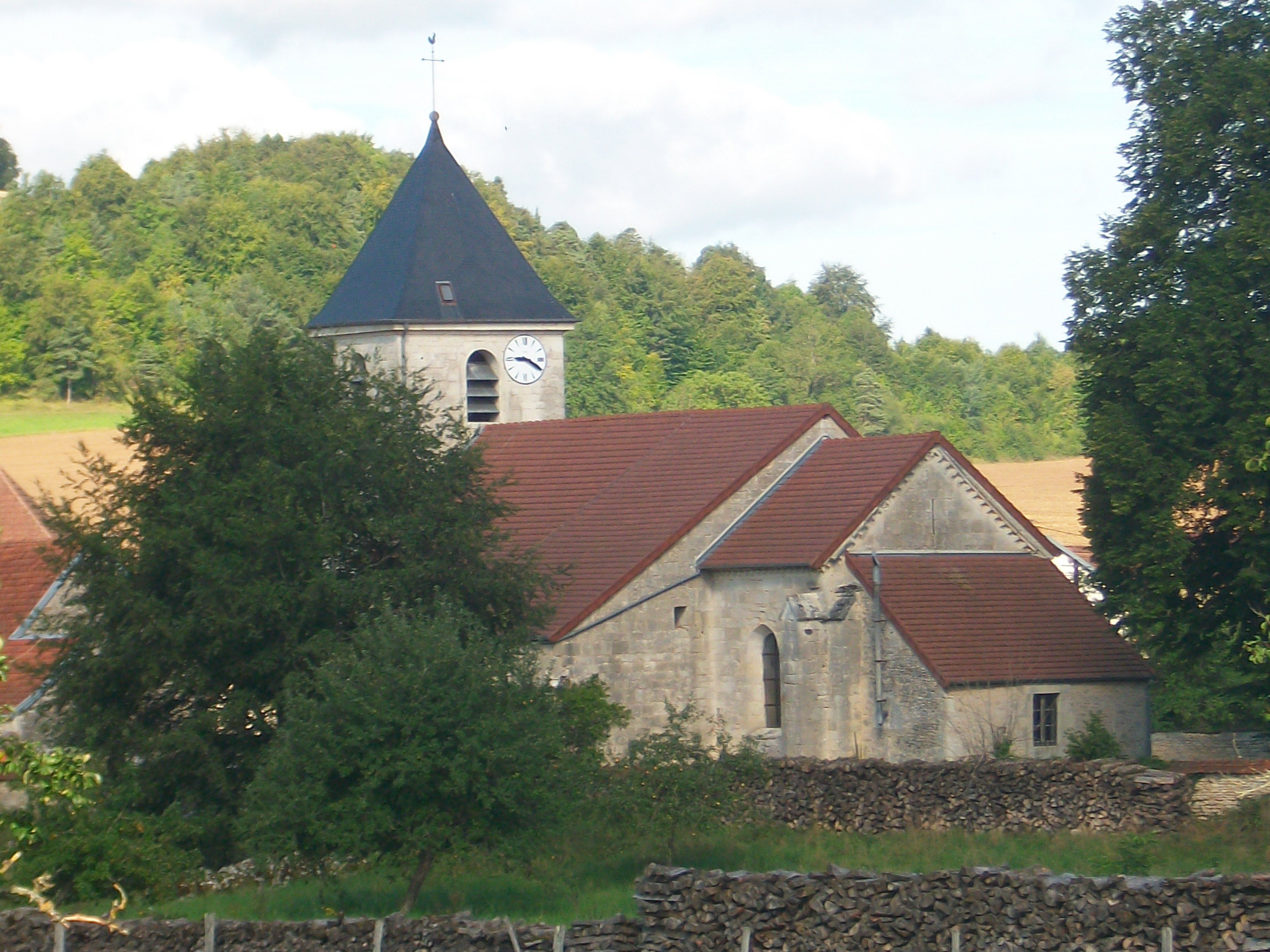 Église paroissiale Saint-Martin